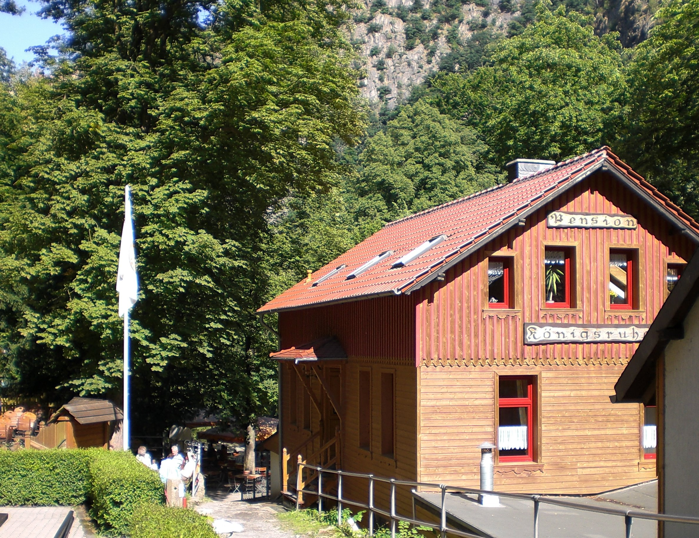 Blick nach Norden auf den durch Königsruhe führenden Wanderweg entlang der Bode